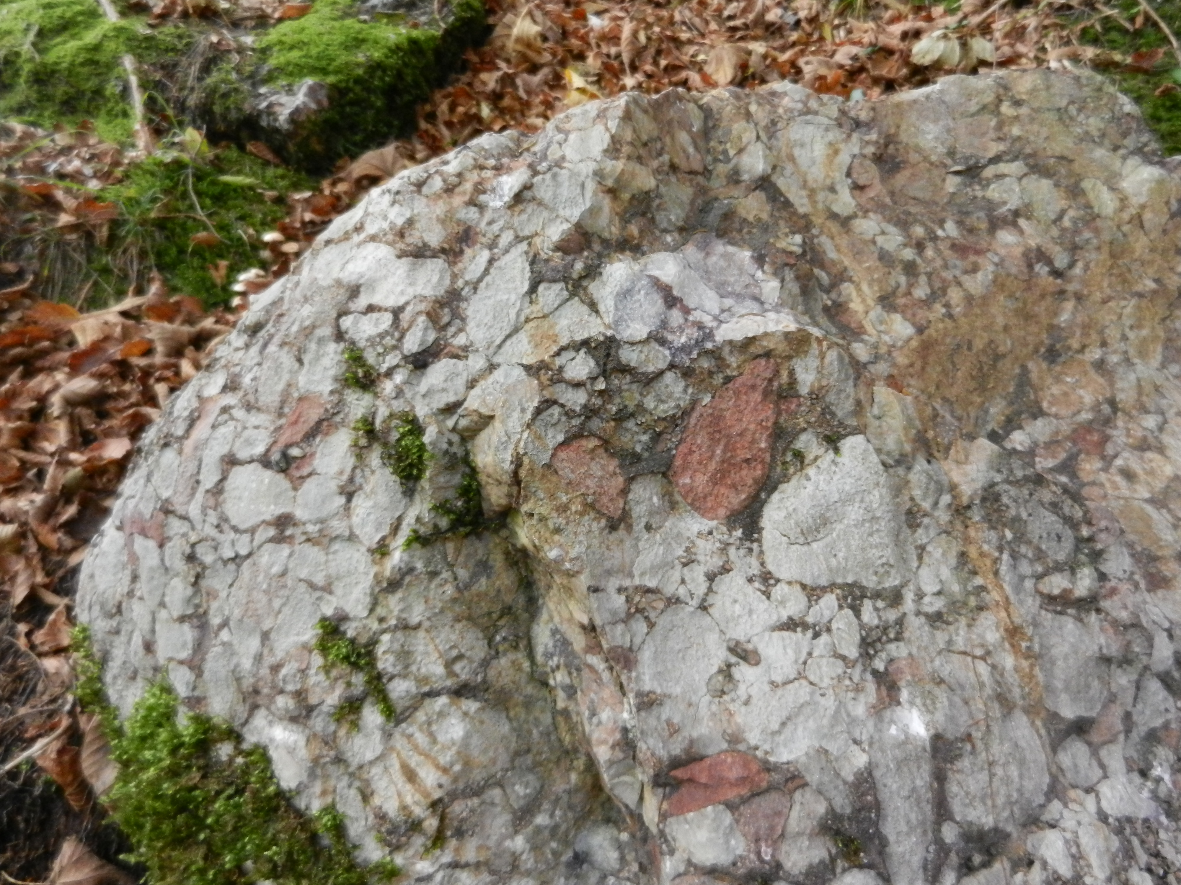 Trbiška breča v Dovžanovi soteski.